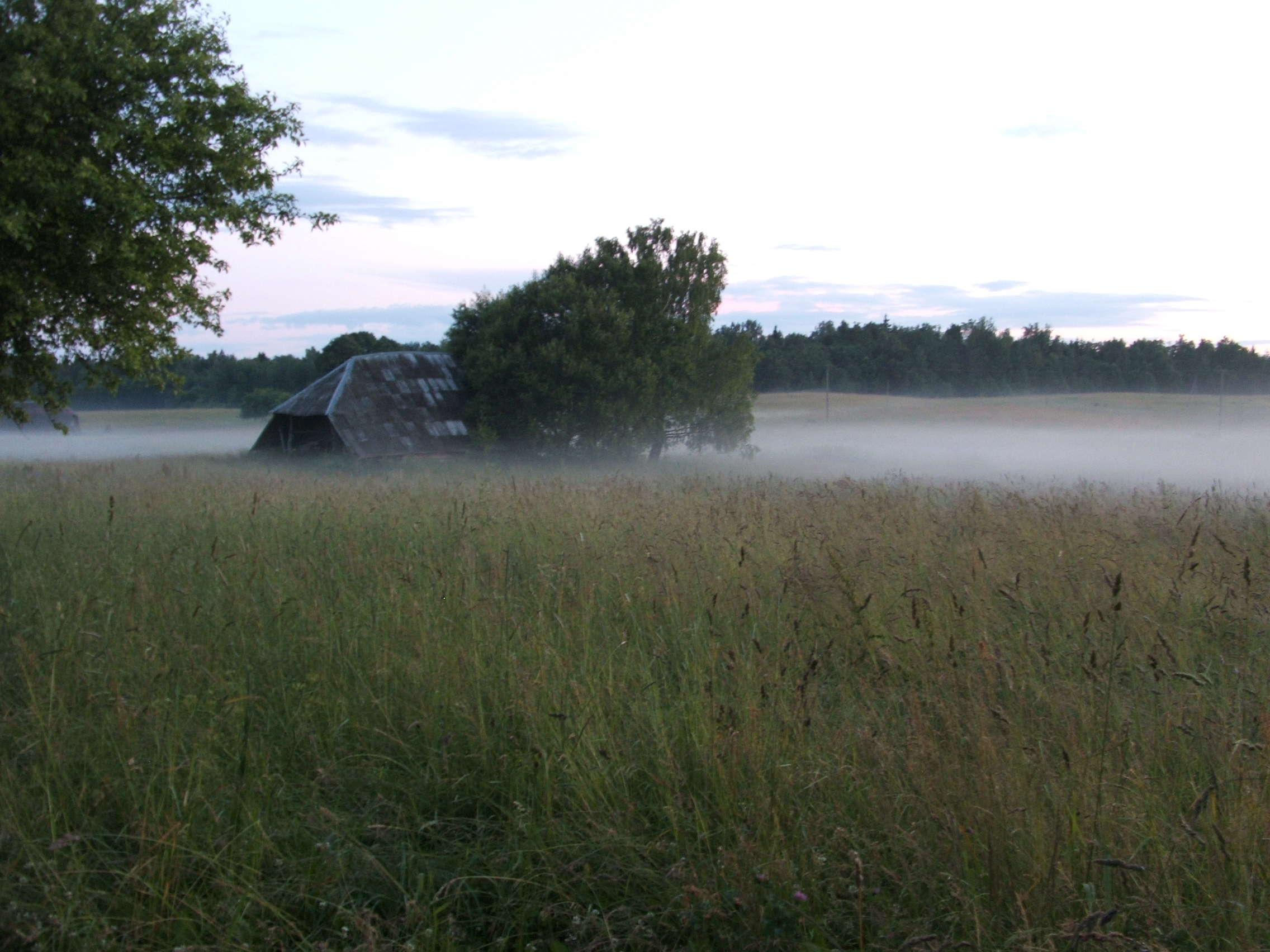 Klojimas vakare, Liesėnų km.